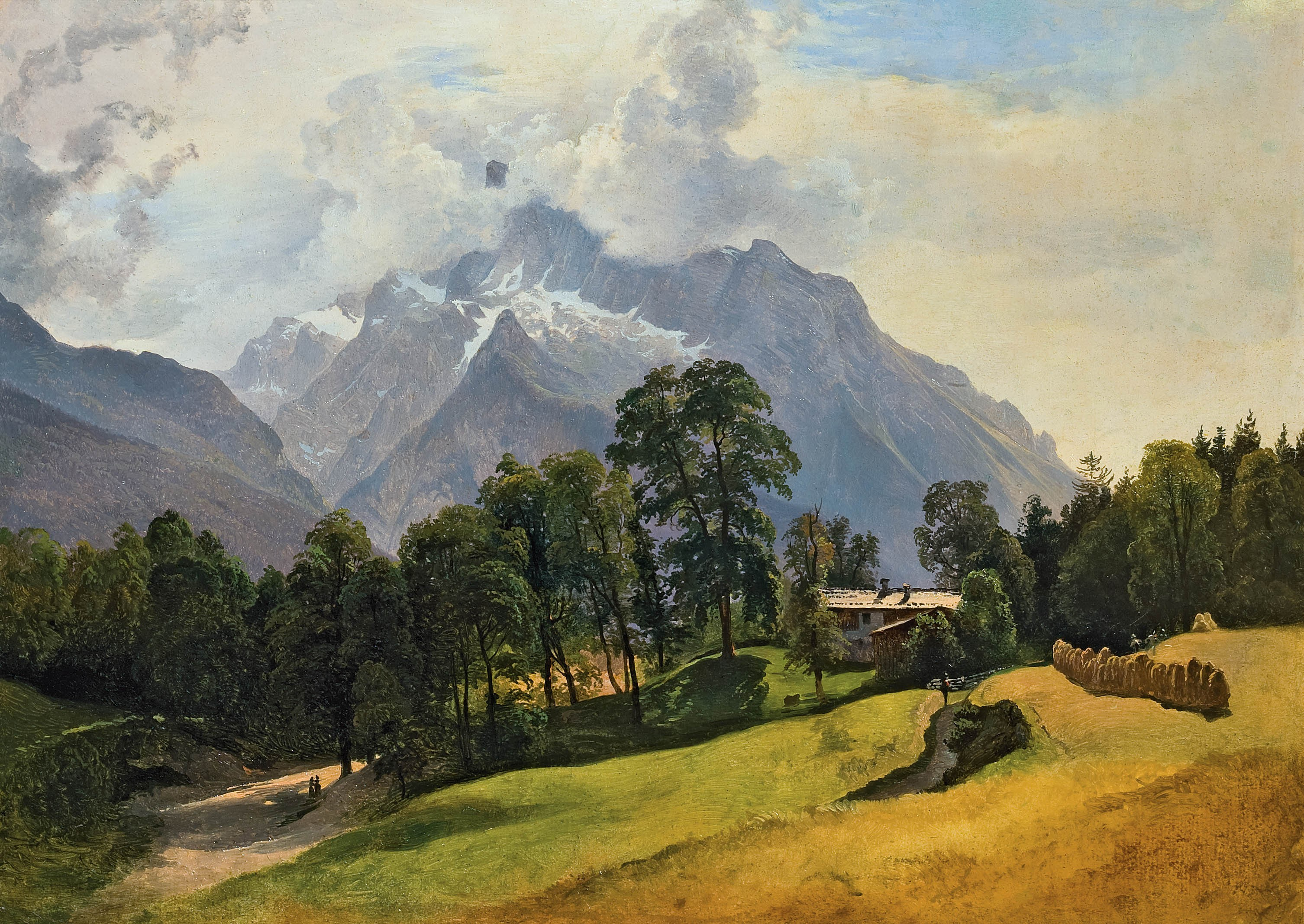 Der hohe Steinberg bei Berchtesgaden.